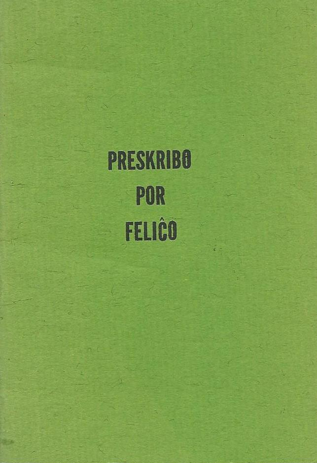 librokovrilo de "Preskribo por Feliĉo", 1968